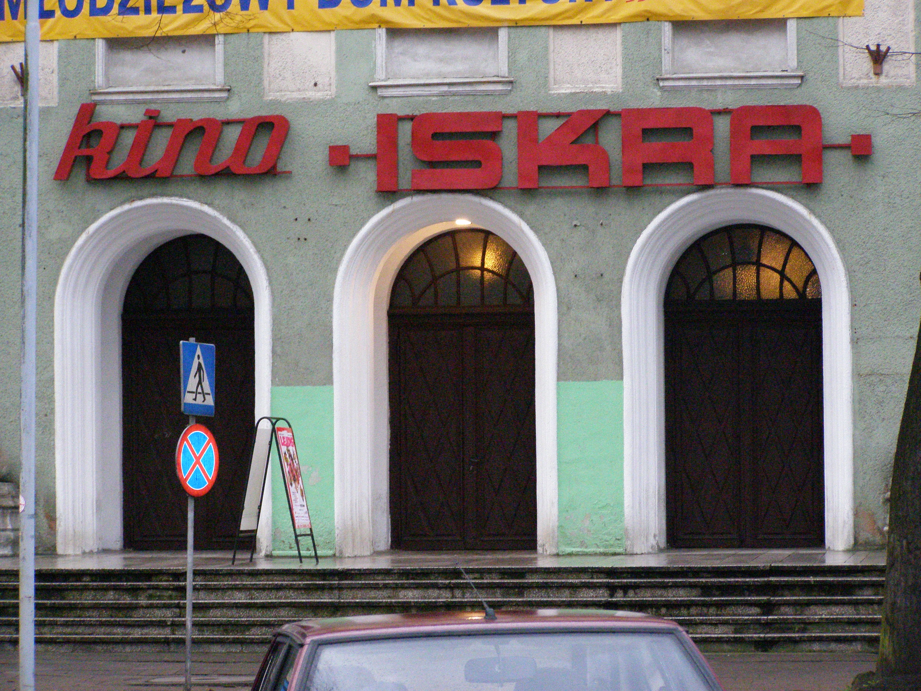 Piła, Kino Iskra